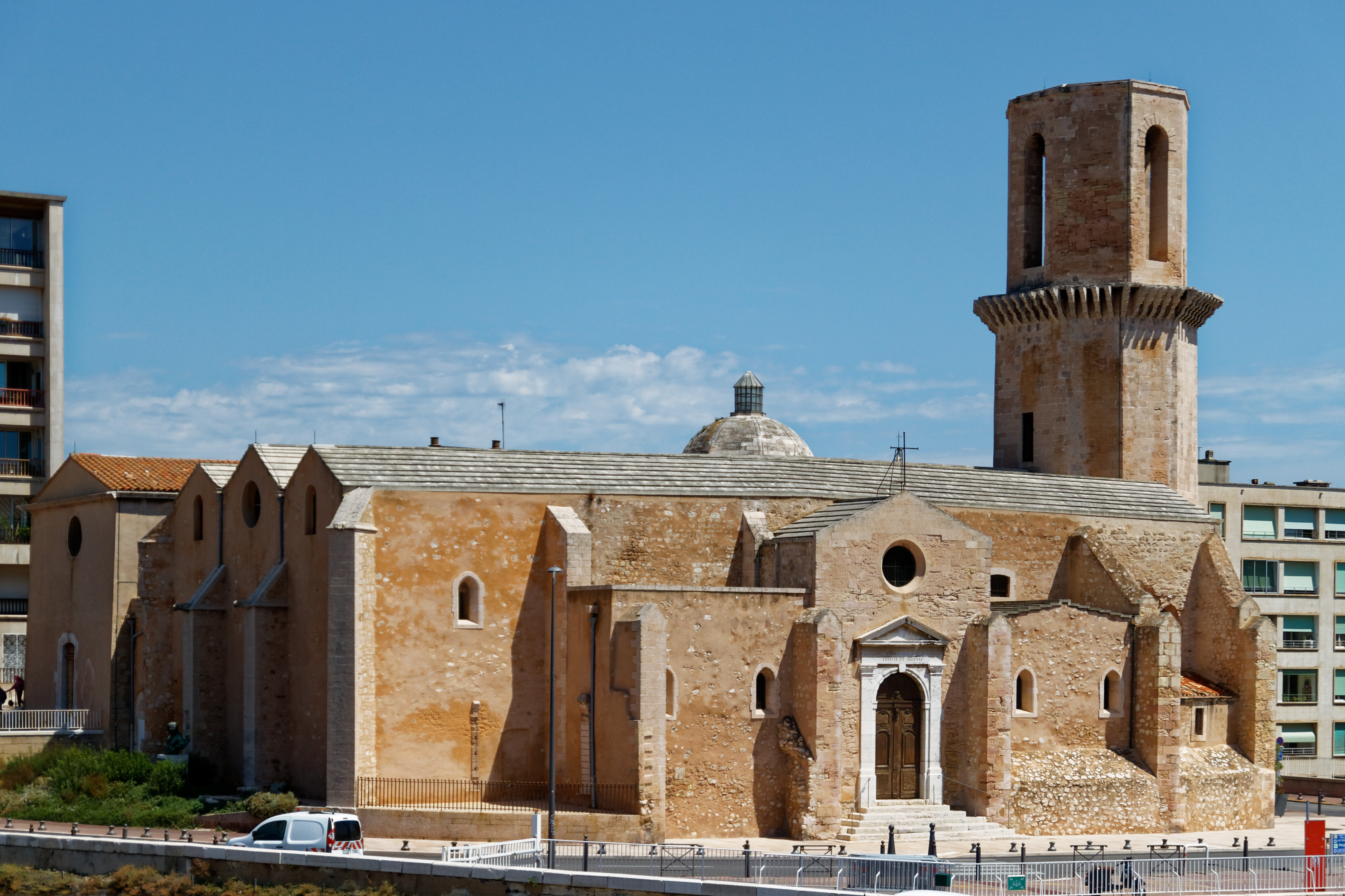 Romanische Kirche Saint-Laurent in Marseille, vom Fort Saint-Jean aus gesehen